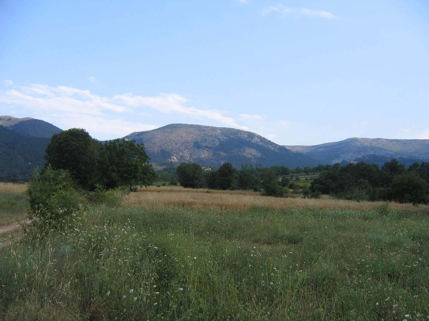 Çengeller Köyü, Gölpazarı, Bilecik